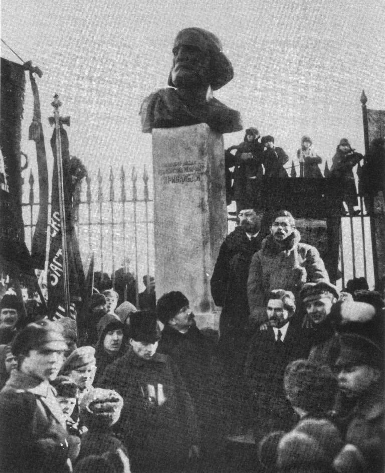 Памятник Джузеппе Гарибальди в Петрограде (1919). Скульптор Карл Зале. На фотографии Карл Зале стоит рядом с А. В. Луначарским.